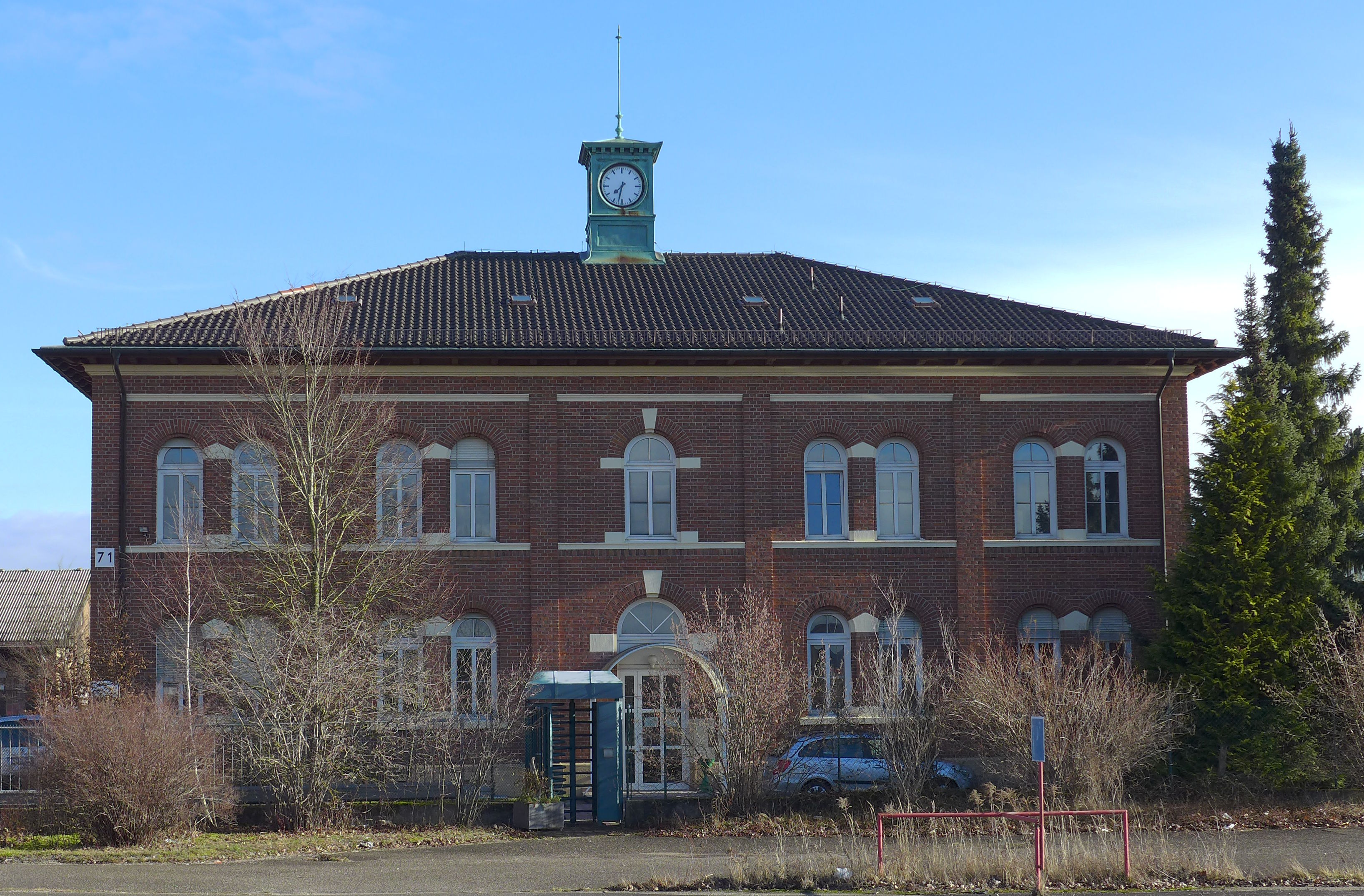 Papinstr. 53 Bau 10, München